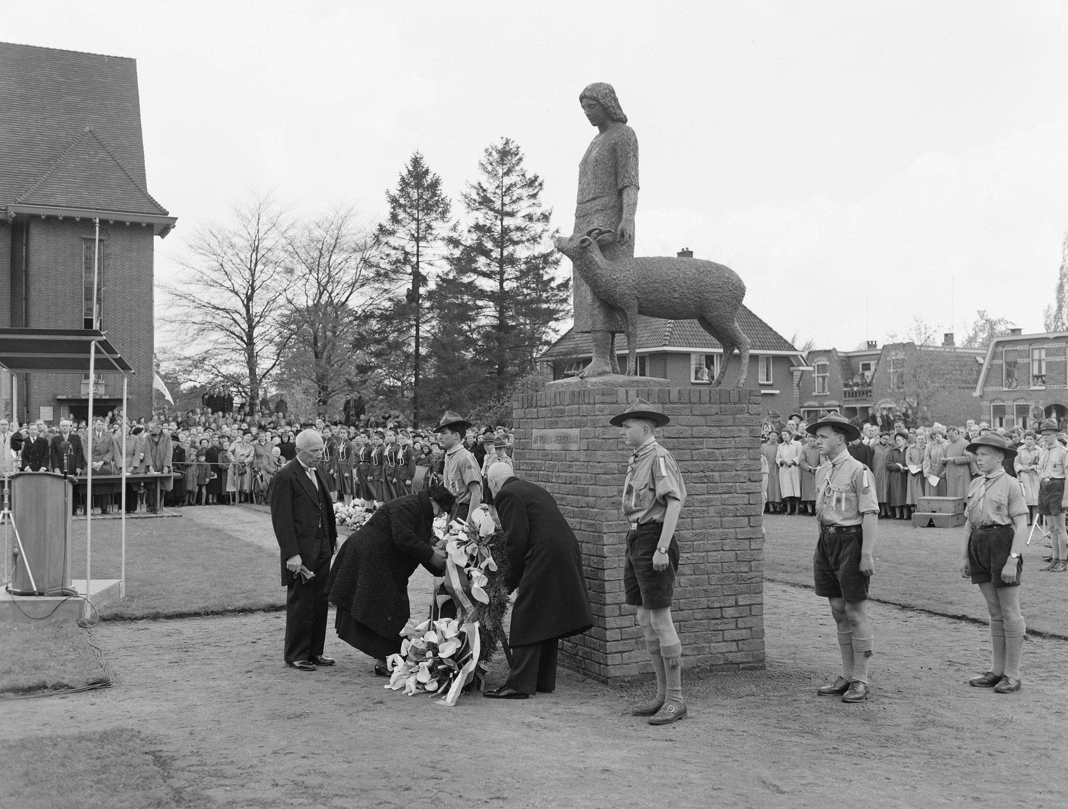 Collectie / Archief : Fotocollectie Anefo Reportage / Serie : [ onbekend ] Beschrijving : Prinses Wilhelmina onthult het beeld 'Tante Riek' te Winterswijk Annotatie : Tante Riek is de bijnaam van verzetsvrouw Helena Theodora [Heleen] Kuipers-Rietberg. Het beeld is een ontwerp van Gerrit Bolhuis Datum : 4 mei 1955 Locatie : Gelderland, Winterswijk Trefwoorden : kransleggingen, onthullingen, oorlogsmonumenten, padvinders, standbeelden Persoonsnaam : Kuipers-Rietberg, Helena Theodora, Wilhelmina (prinses Nederland) Fotograaf : Pot, Harry / Anefo, [onbekend] Auteursrechthebbende : Nationaal Archief Materiaalsoort : Negatief (zwart/wit) Nummer archiefinventaris : bekijk toegang 2.24.01.04 Bestanddeelnummer : 907-1160